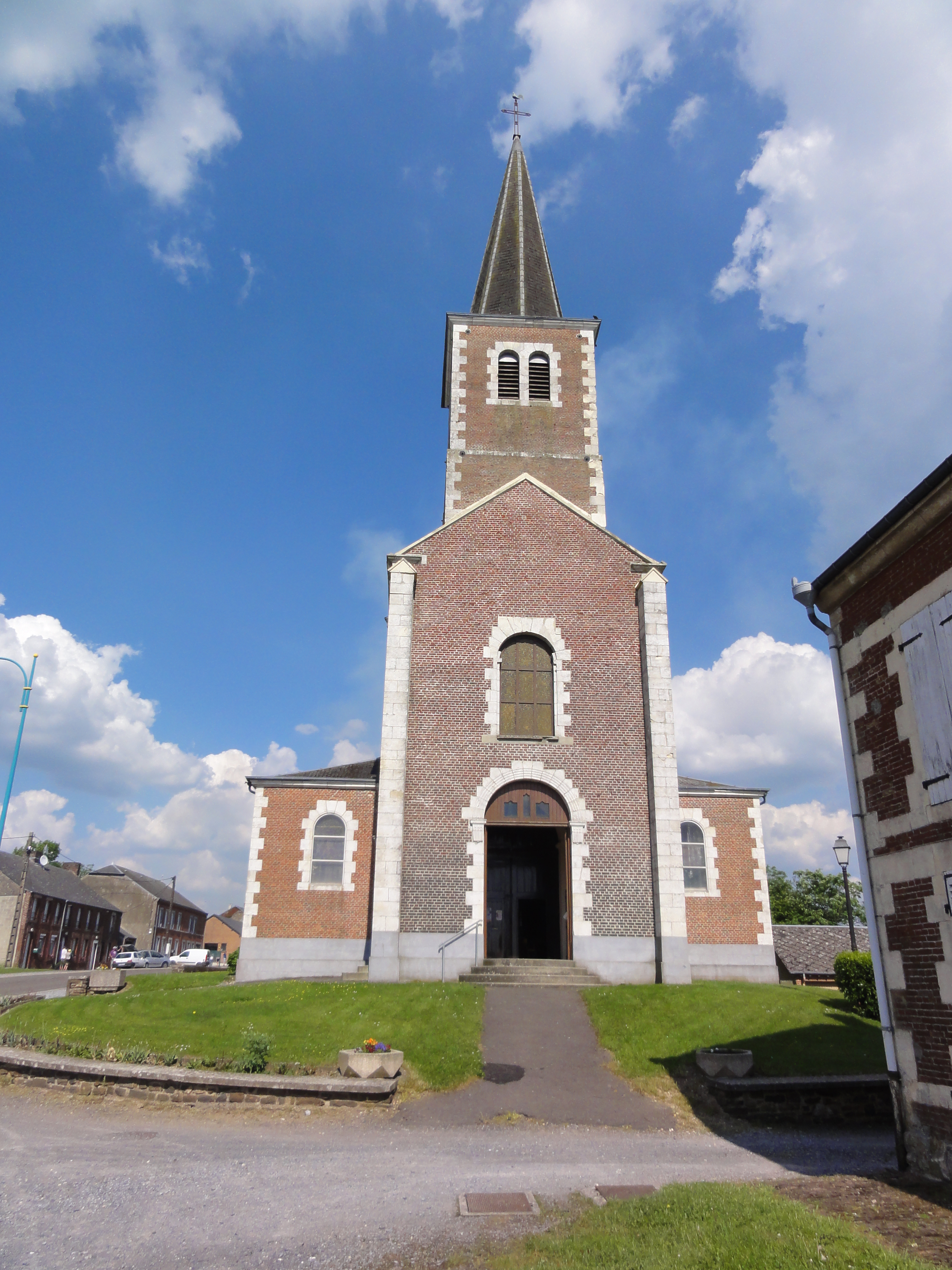 Éteignières (Ardennes) Église